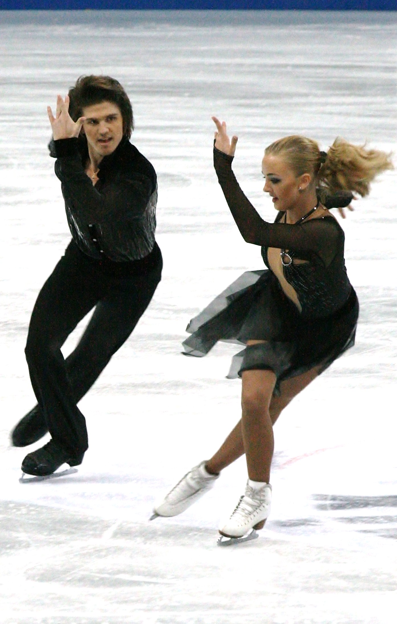 Александра Степанова и Иван Букин (Россия) на финале Гран-при среди юниоров 2012-2013. Произвольный танец.